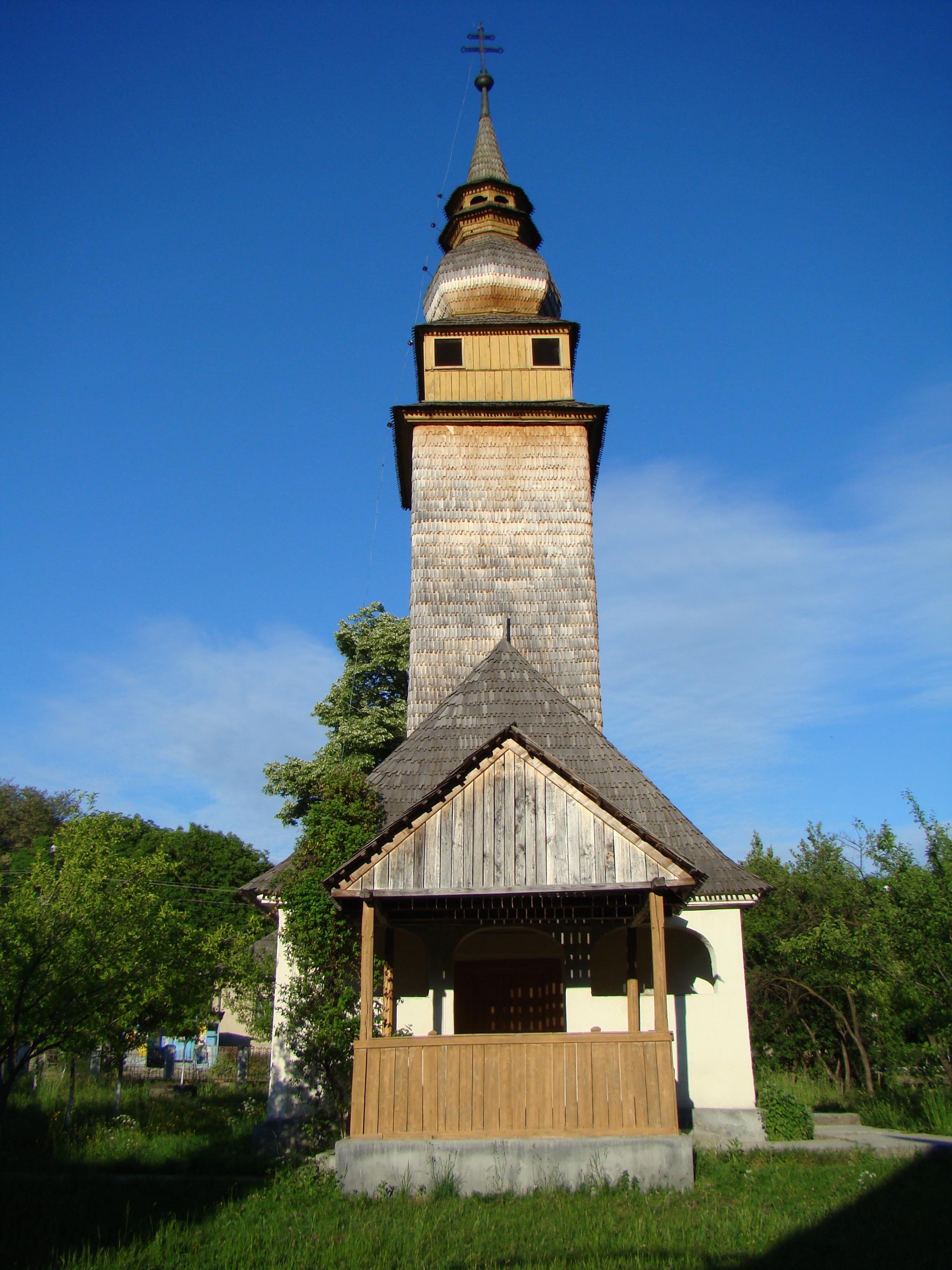 Biserica de lemn din Valea Chioarului, Maramureş, România